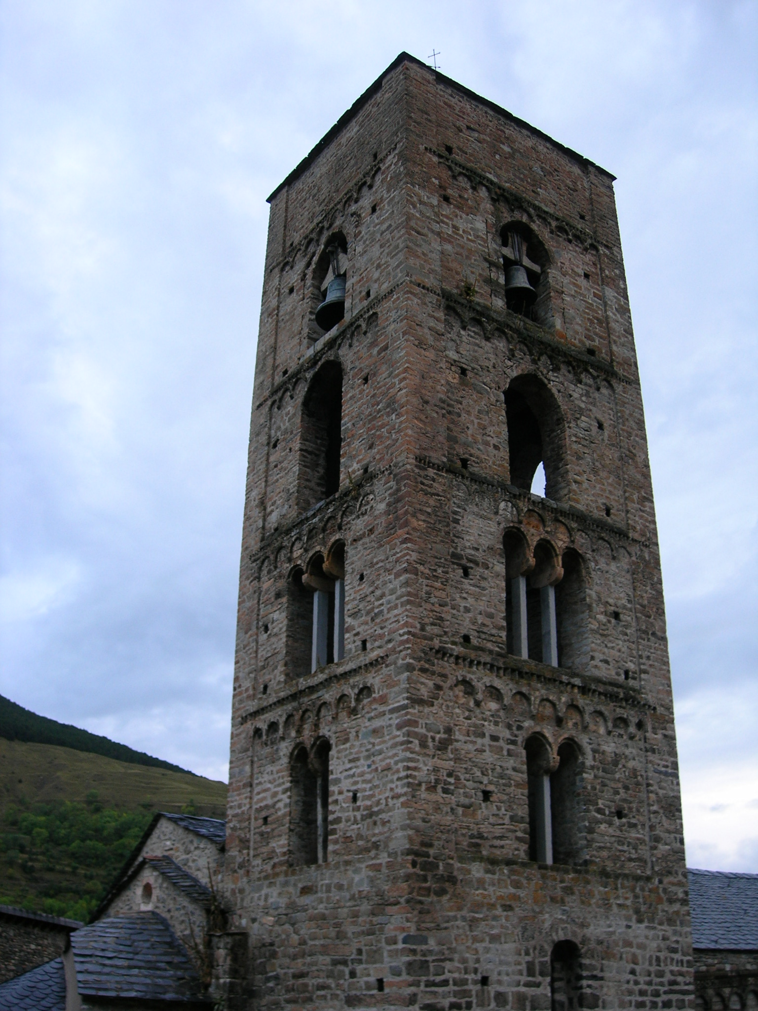 Església de la Nativitat de Durro (la Vall de Boí)